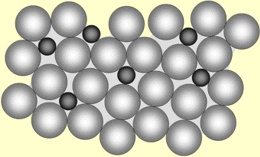 Atomet e substancës së dytë bashkohet me ato të substancës tjetër, duke e pamundësuar rrëshqitjen e shtresave.